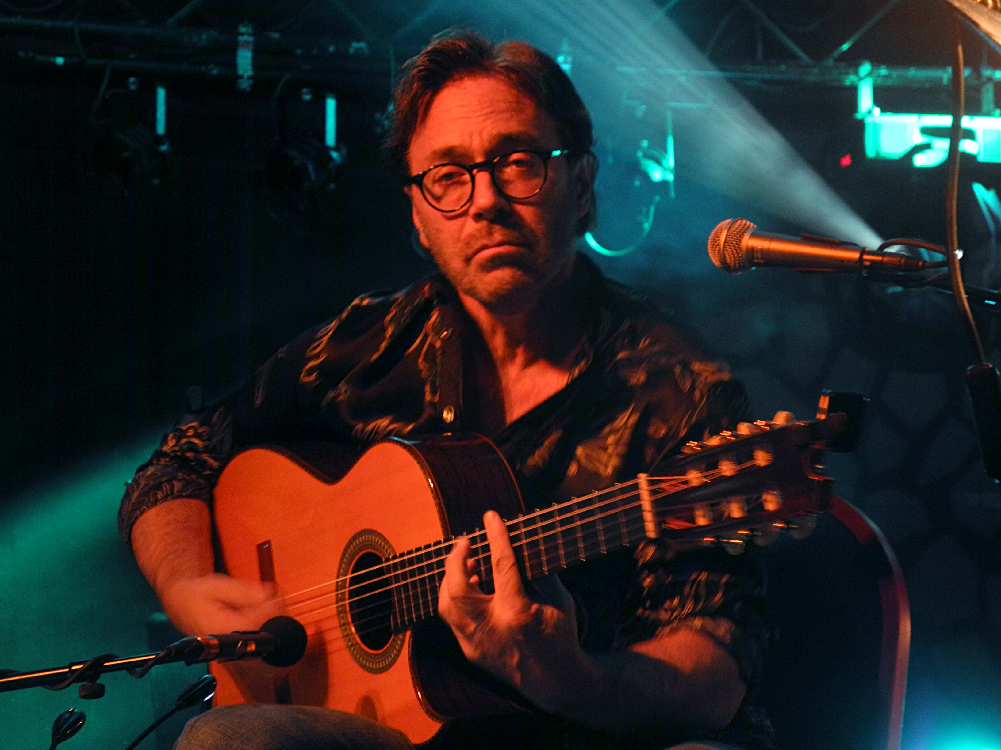 Il chitarrista jazz fusion Al di Meola al 'Den Atelier', Luxembourg